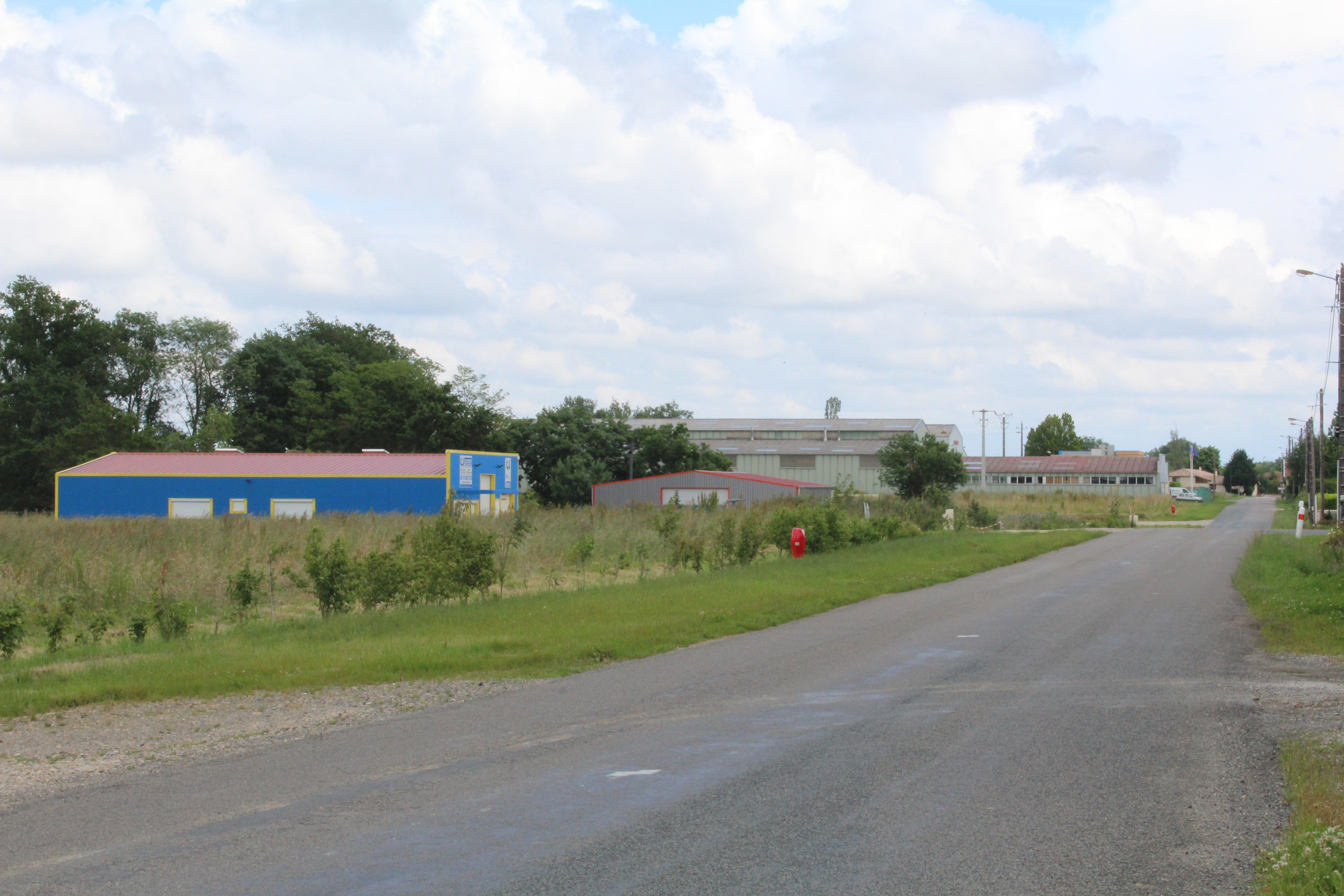 Zone d'entreprises à Perrex le long de la route départementale D80E.